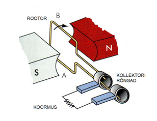 vahelduvvoolu generaatori ehitus